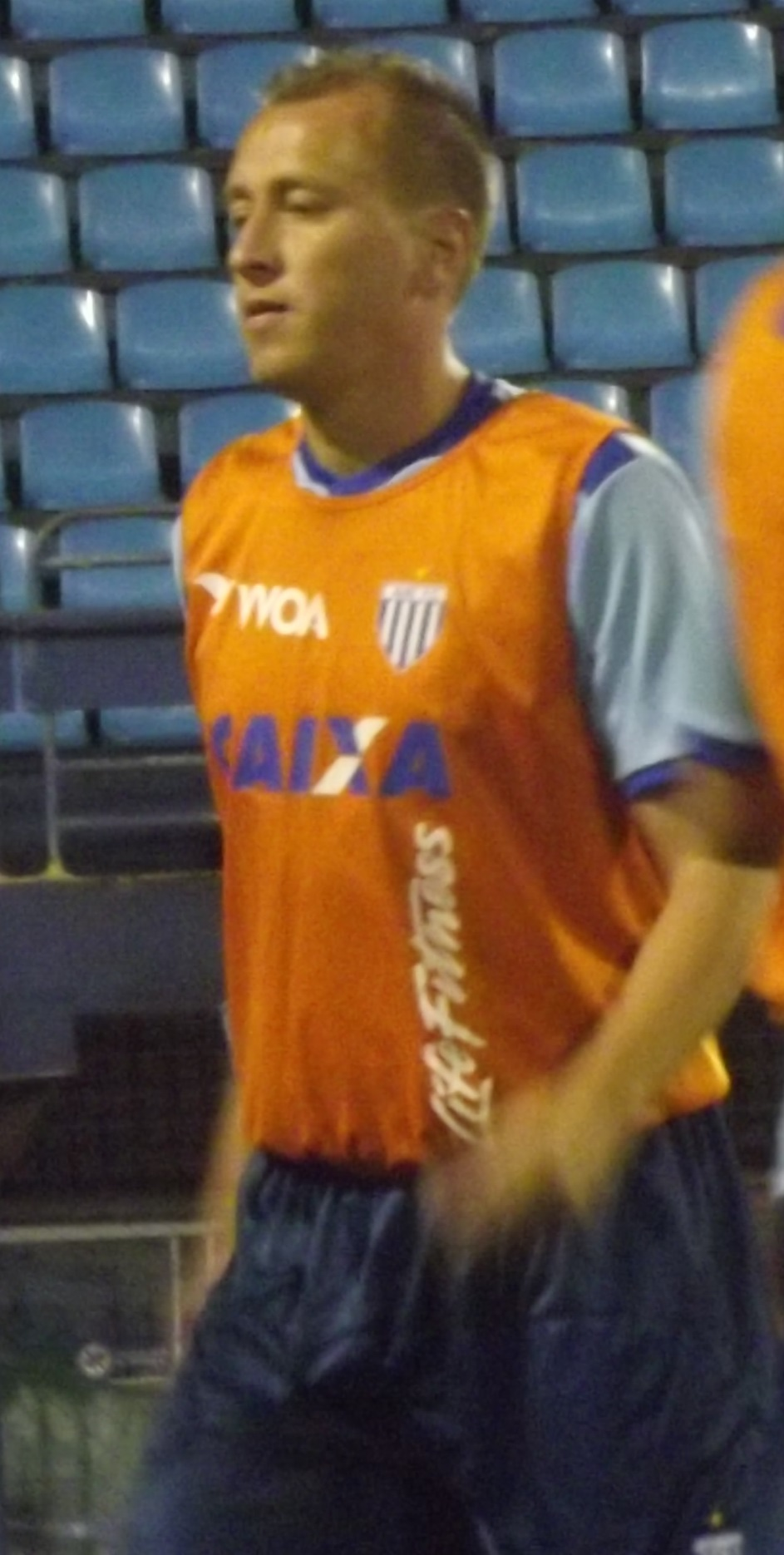 Marquinhos atuando pelo Avaí.